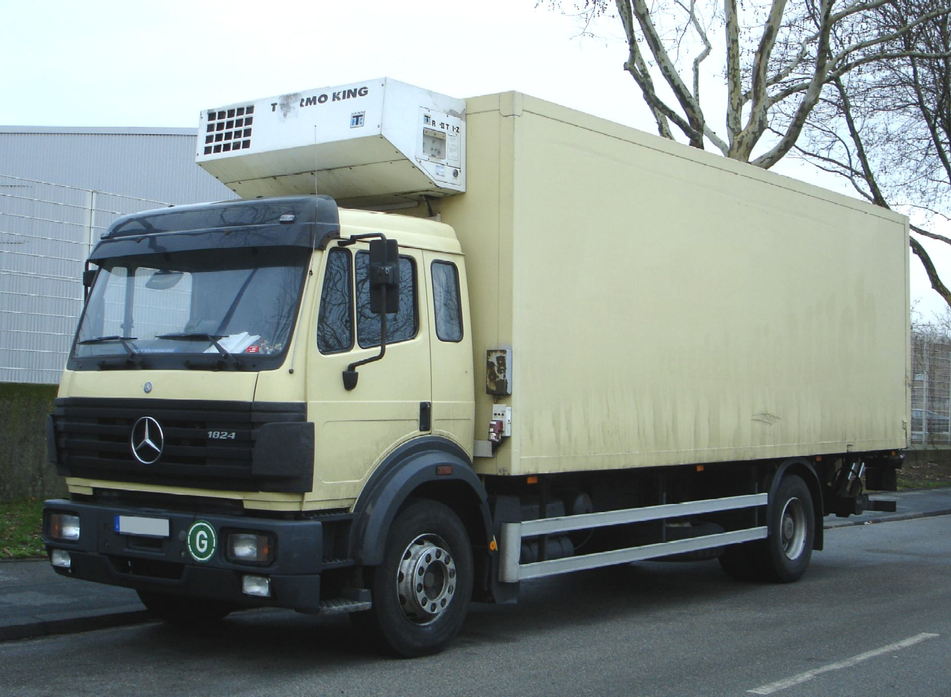 Mercedes-Benz SK Kühlwagen